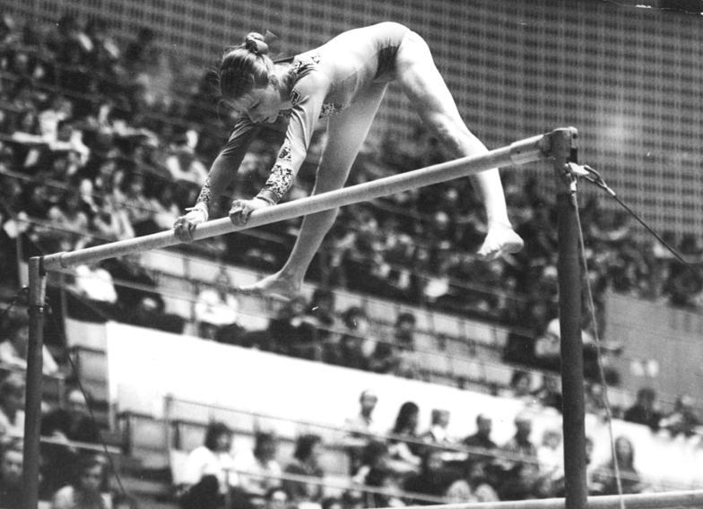 Gitta Escher ADN-ZB Schaar 20.3.76 Suhl: DDR-Turnmeisterschaften der Frauen - Neue DDR-Meisterin im Turn-Mehrkampf wurde am 19.3.76 in Suhl die 19jährige Gitta Escher, hier bei ihrer Kür am Stufenbarren, mit 78,075 Punkten.